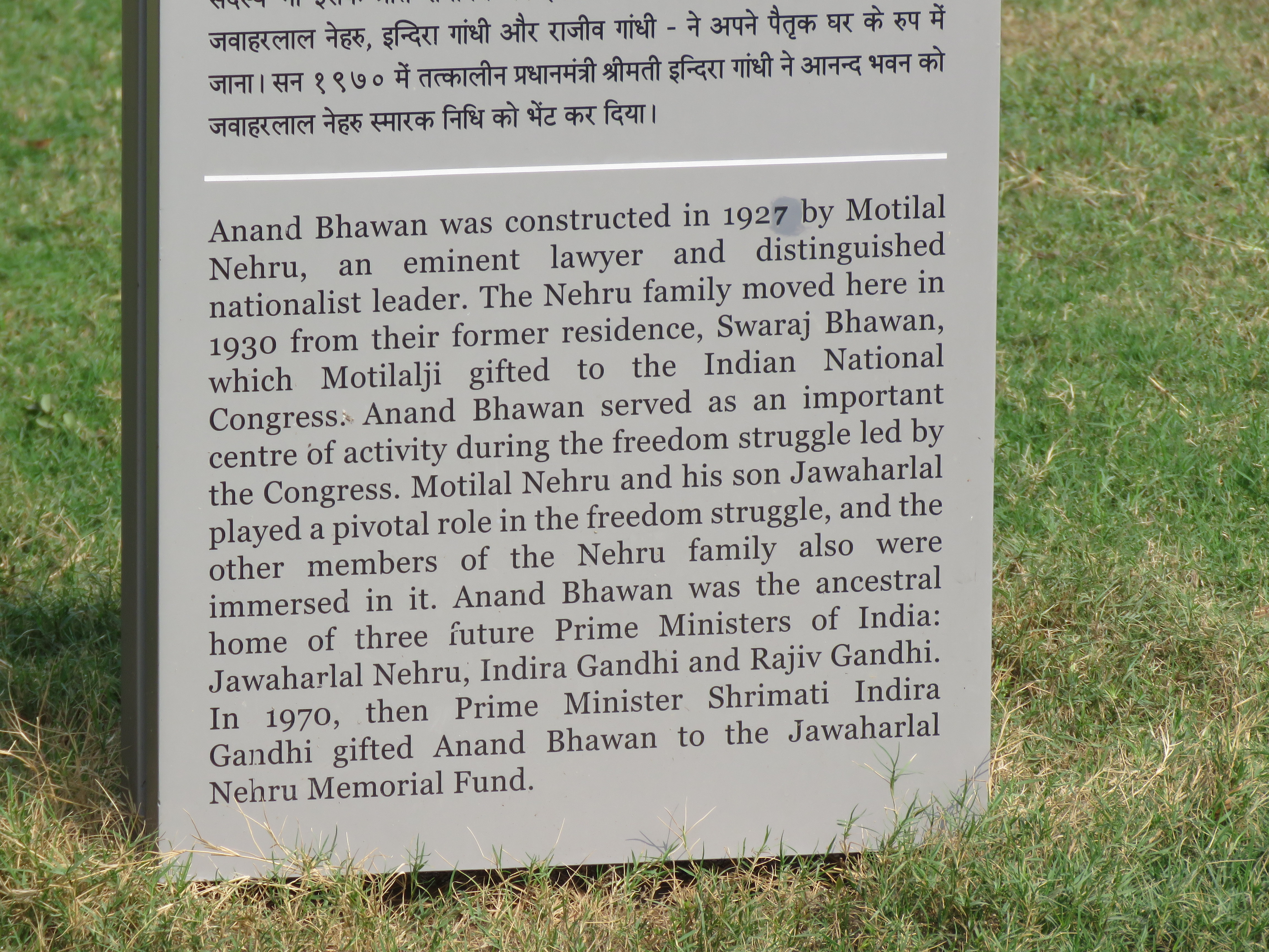 Anand Bhavan, Swaraj Bahvan - Photos during IRCTC 2017 - by Vinayaraj